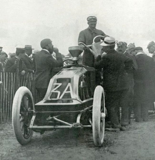 Grand Prix de l'ACF 1906, ravitaillement de Ferenc Szisz (première journée).